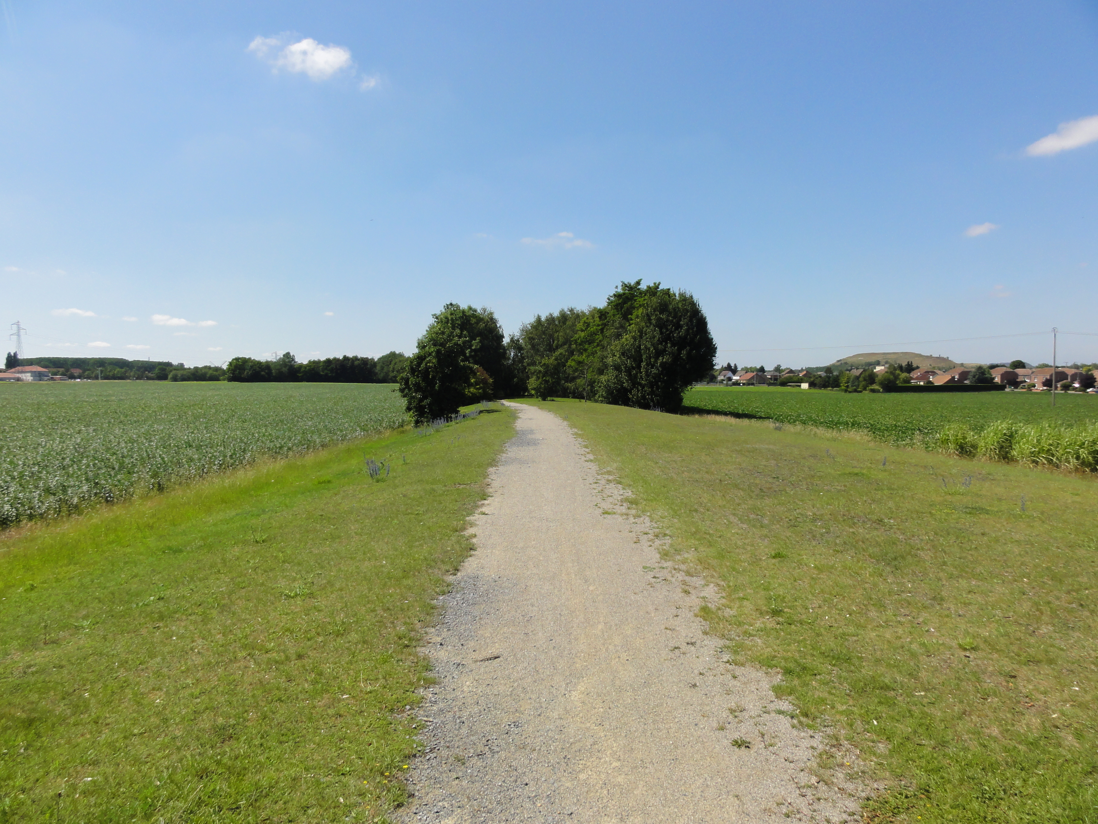 Terril n° 214 dit Cavalier de Courcelles, Fosse n° 7 - 7 bis de la Compagnie des mines de l'Escarpelle, Auby et Courcelles-lès-Lens, Nord et Pas-de-Calais, Nord-Pas-de-Calais, France.